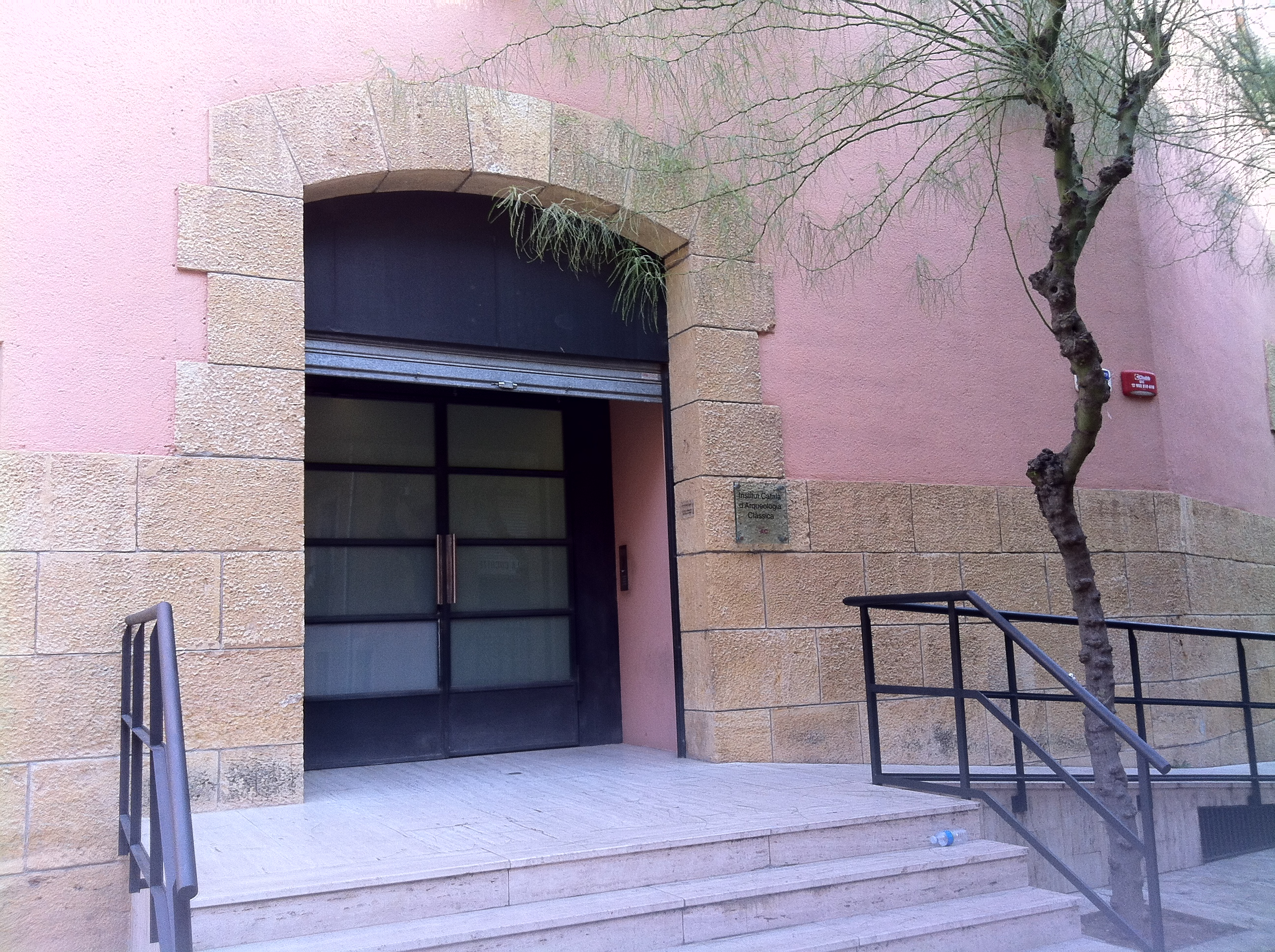 Institut Català d'Arqueologia Clàssica